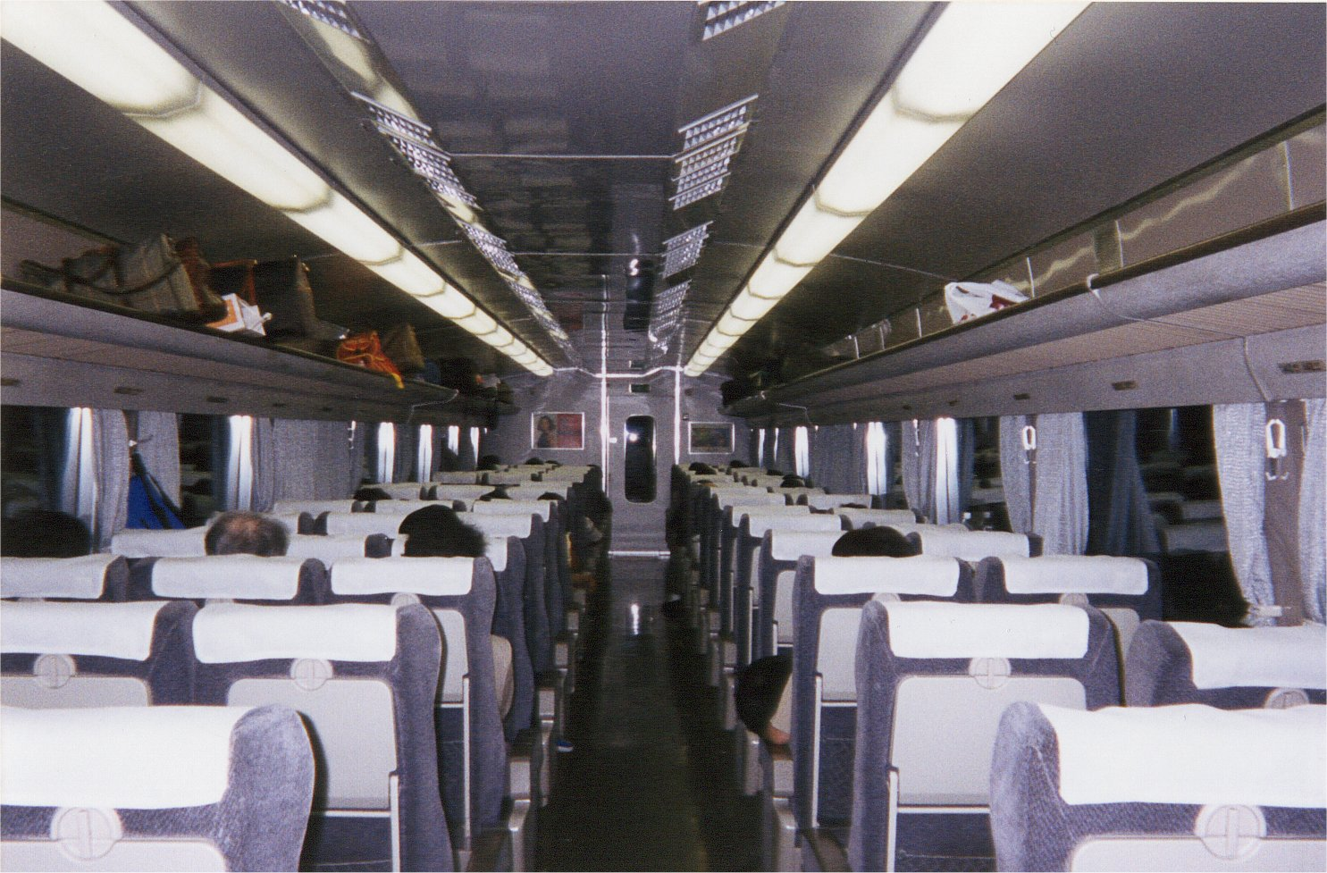 0系27形車内